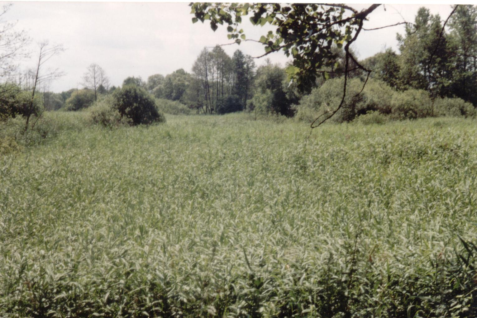 Bagna w miejscu dawnych stawów dworskich we wsi Raducz